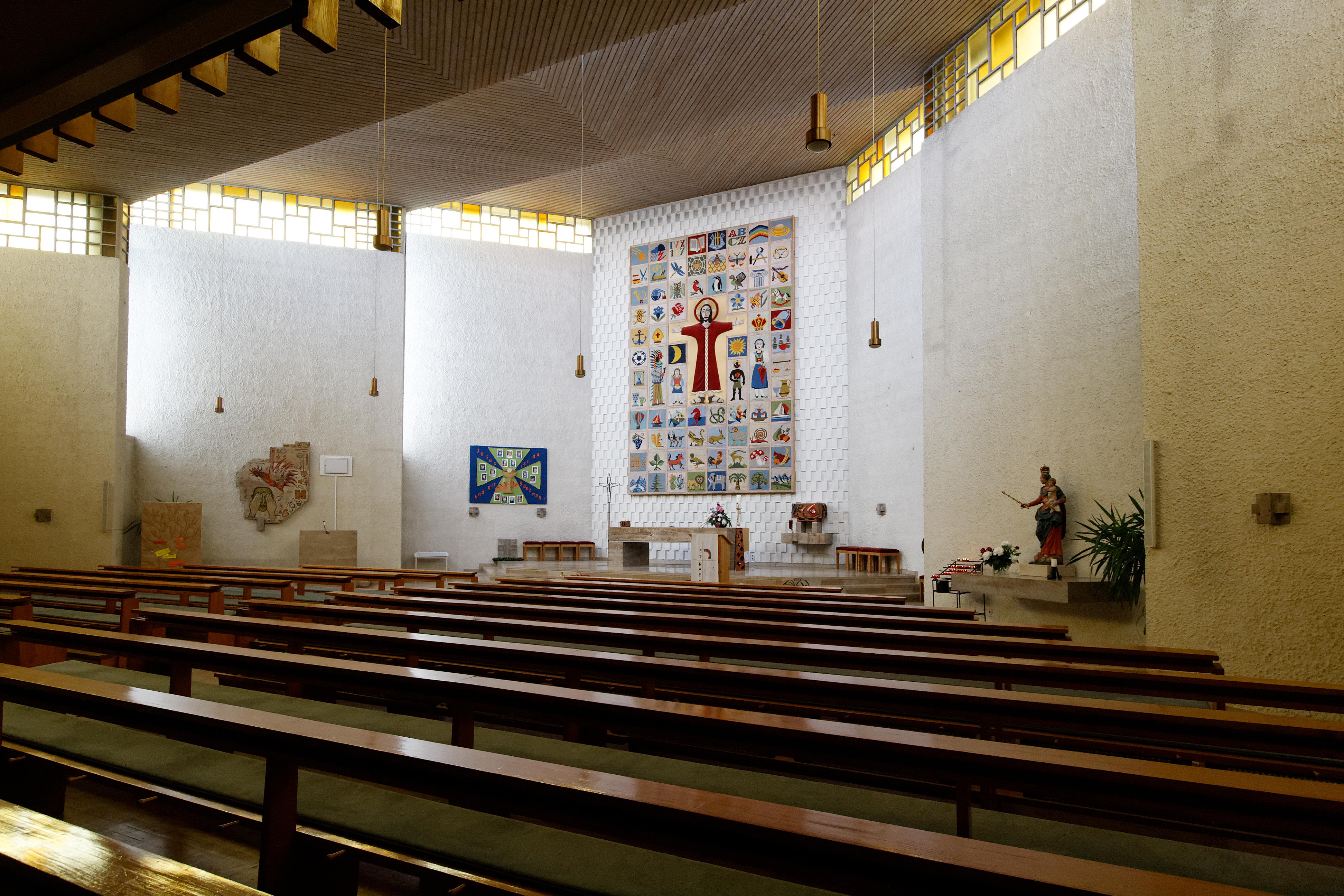 Katholische Kirche St. Raphael in Rutesheim (Baden-Württemberg), errichtet 1961/1962.